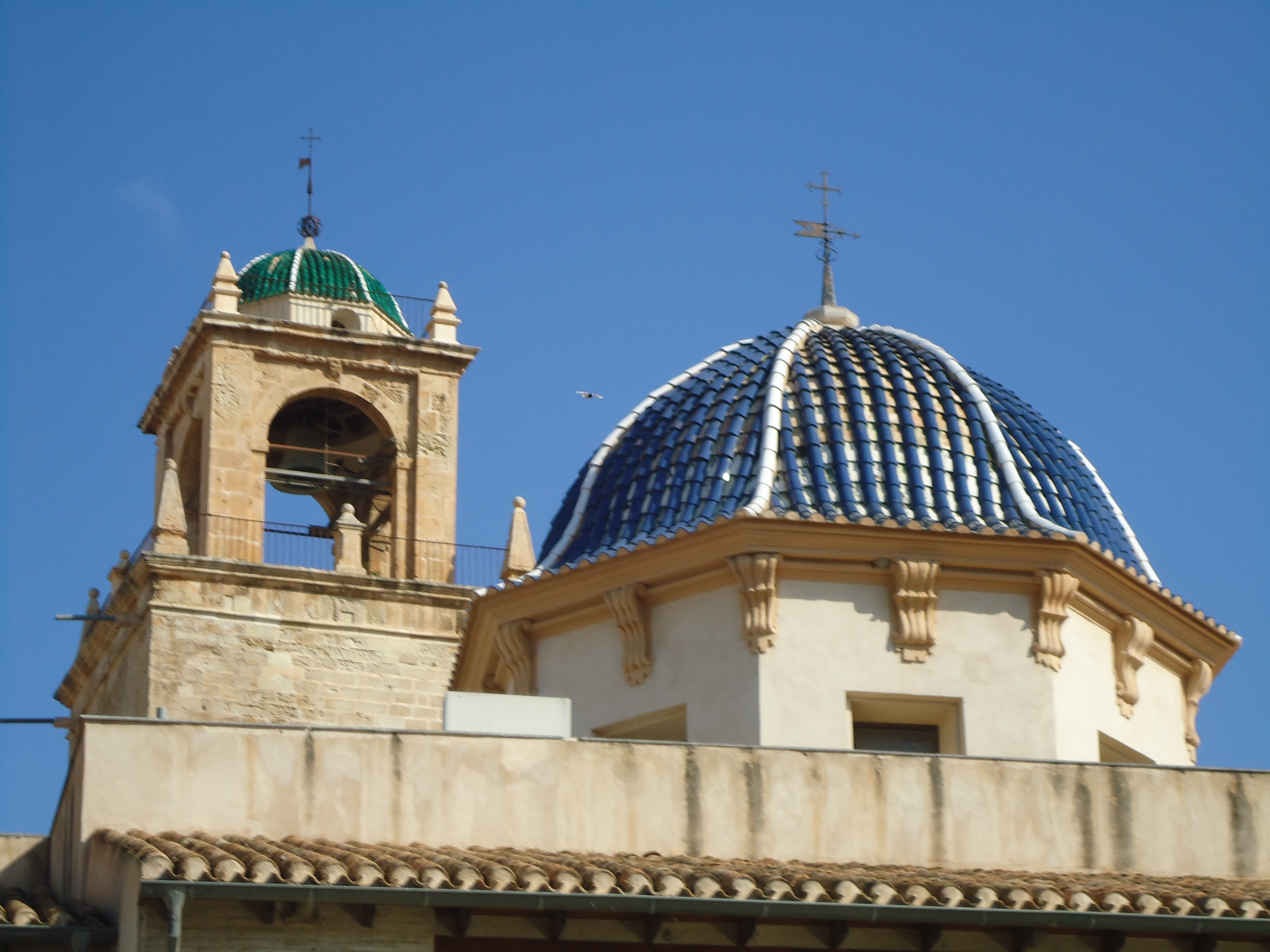 Cúpula del Palau Episcopal i torre de la Catedral, Oriola